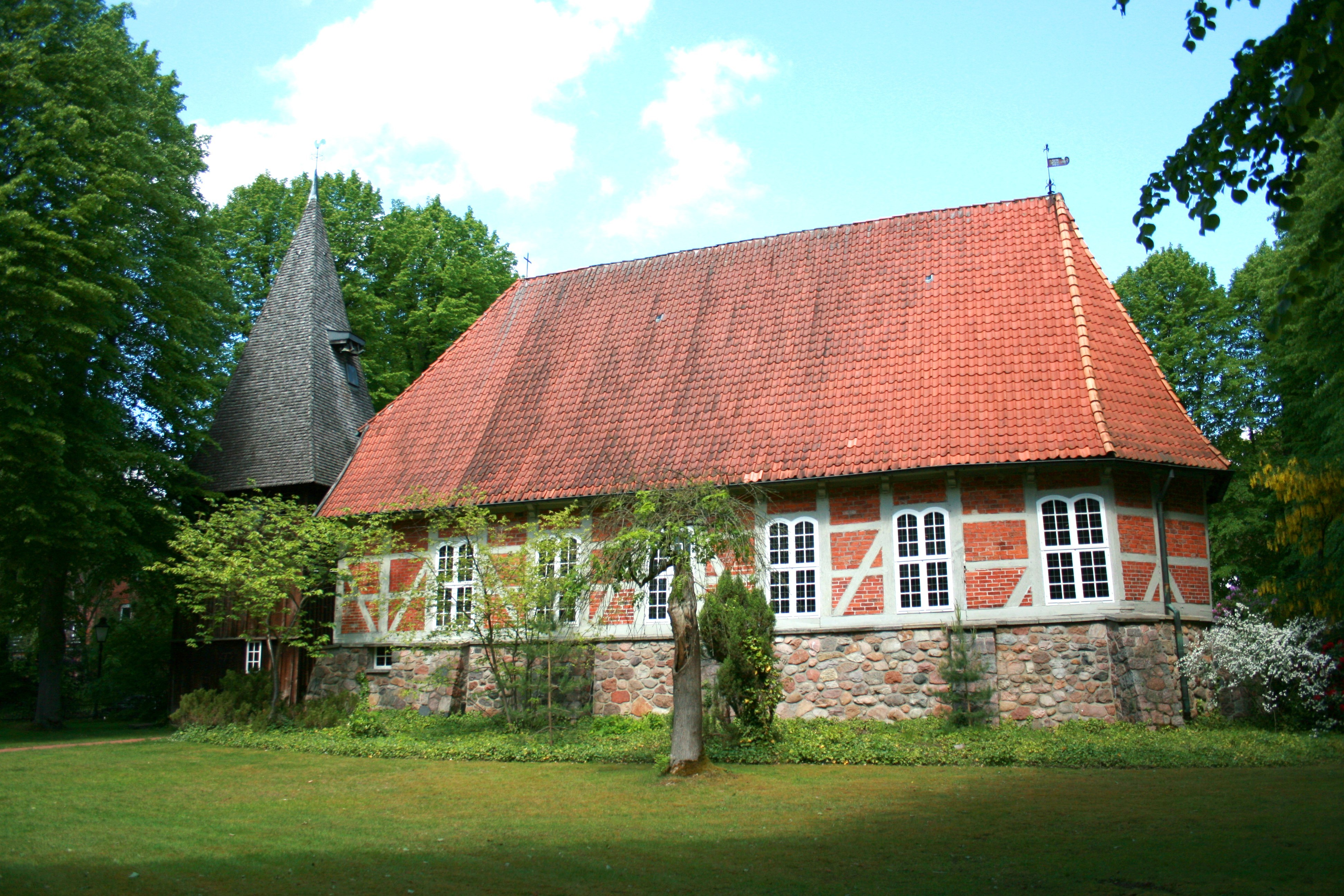 Sankt Stephanus in Egestorf